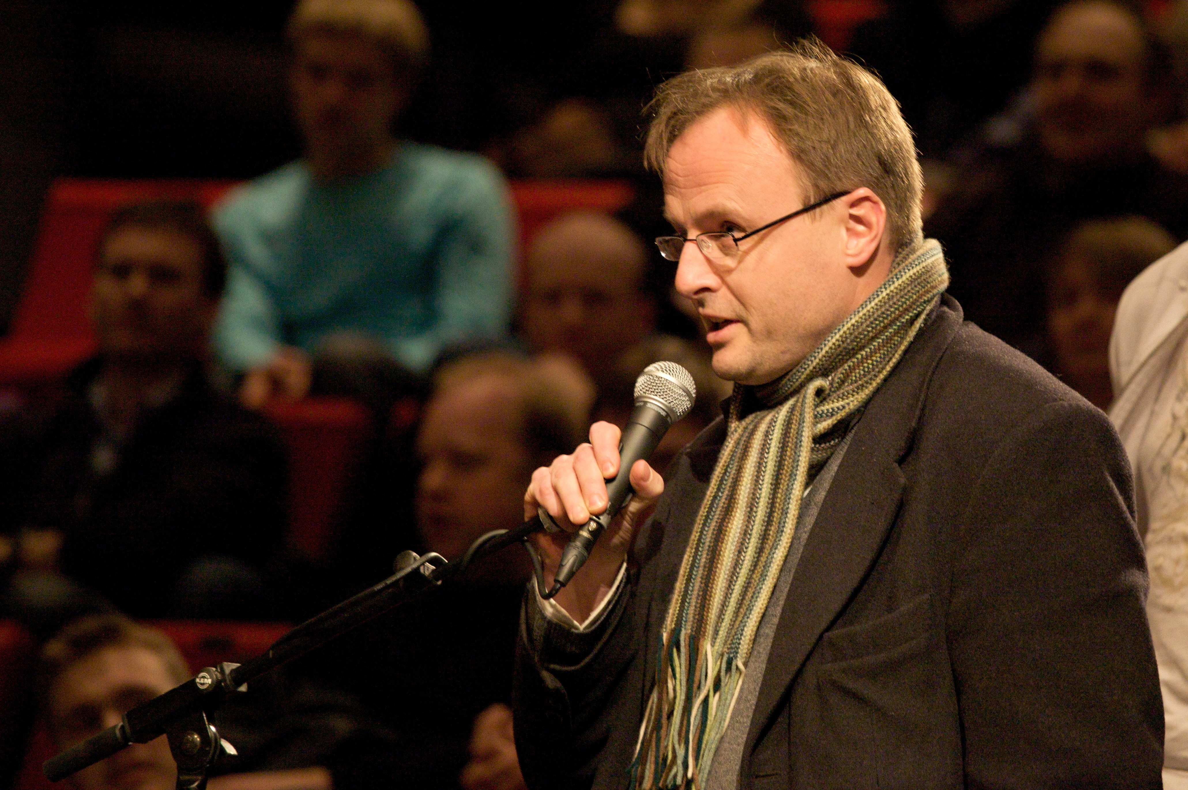 Håkon Wium Lie under Richard Stallmans foredrag i Oslo i 2009.